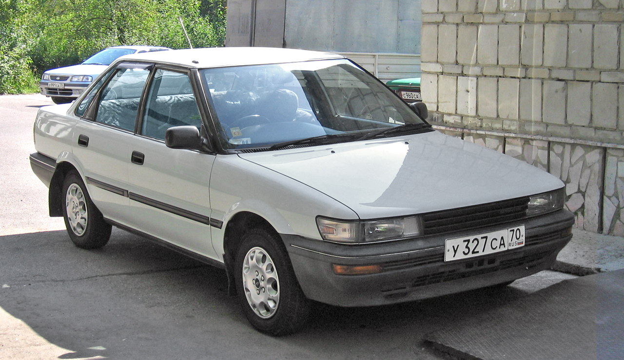 Photo taken in Seversk, Russia